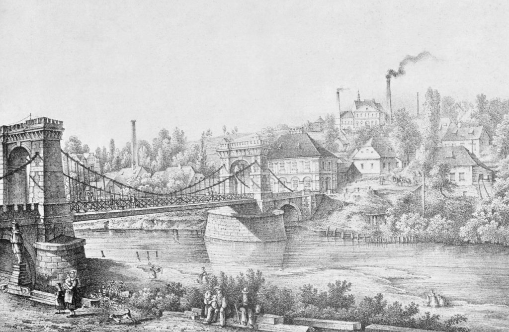 Říšský most přes Ostravici